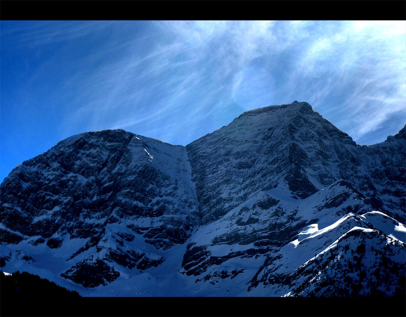 Est du Cirque de gavarnie. De gauche (est) à droite (ouest) : grand Astazou, couloir Swan, et petit Astazou.